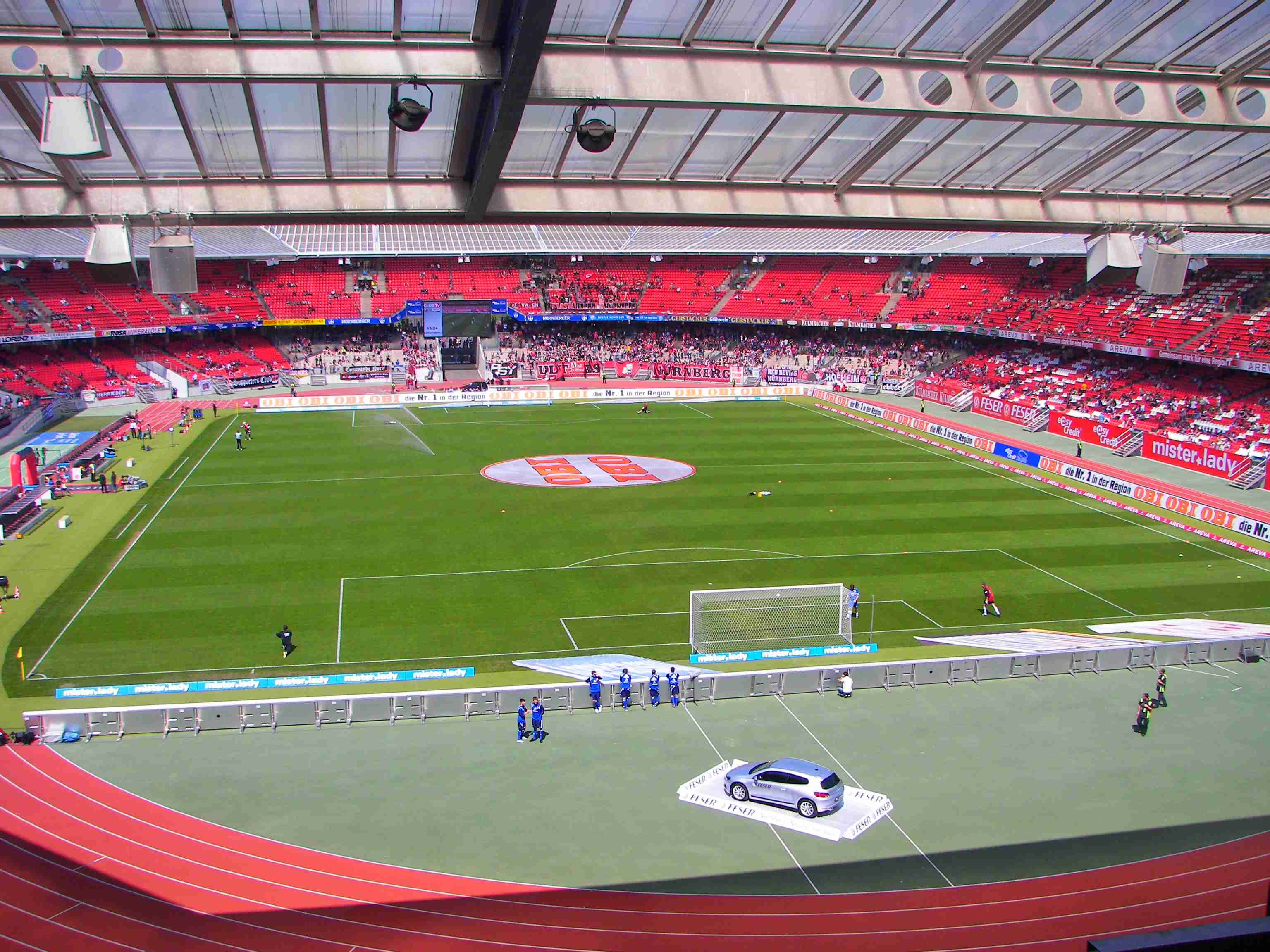 Innenansicht des easyCredit-Stadions vor einem Club-Spiel